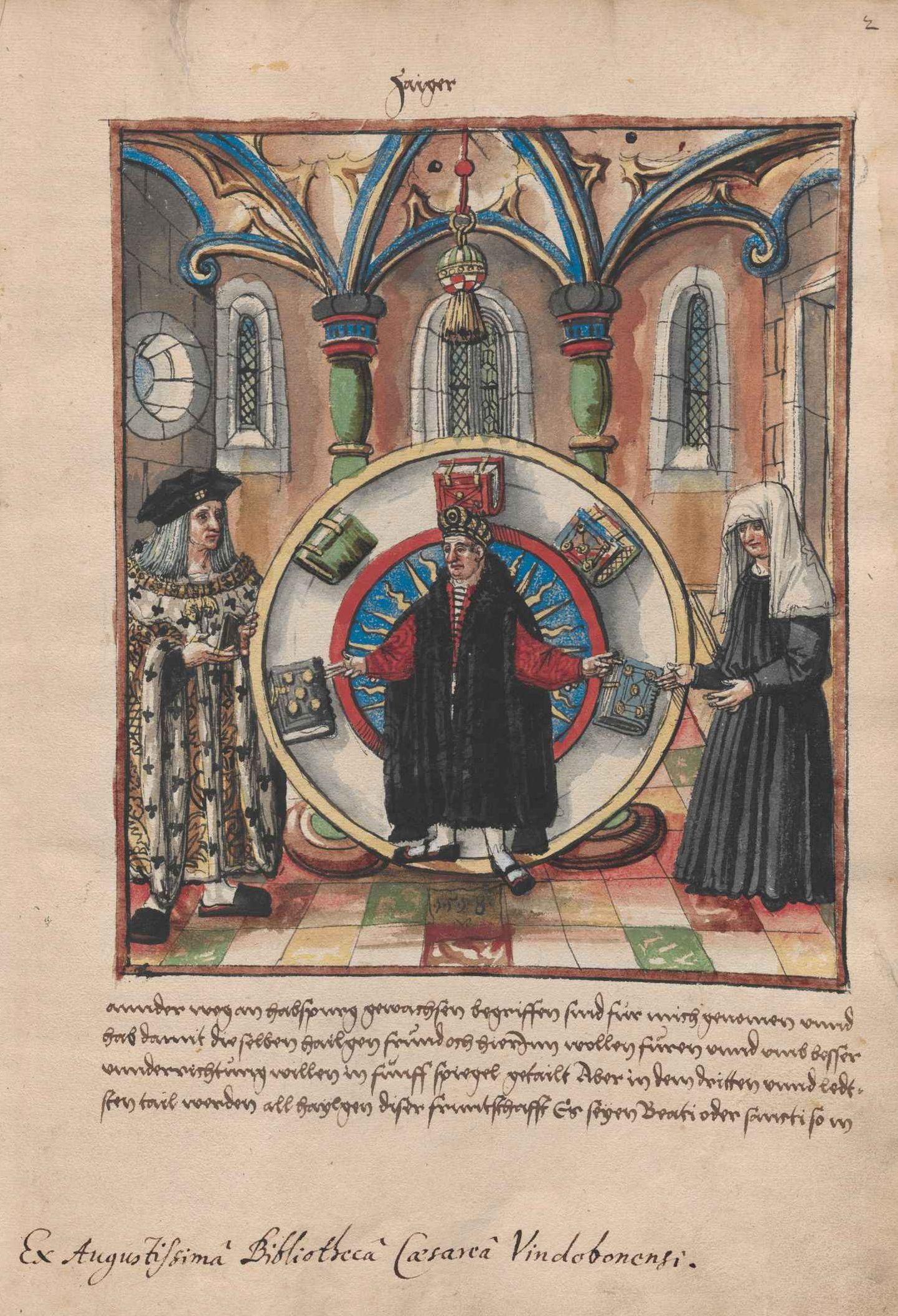 Jakob mennel überreicht seine Chronik Maximilian I., "Der Zaiger", ÖNB Wien Cod. 7892